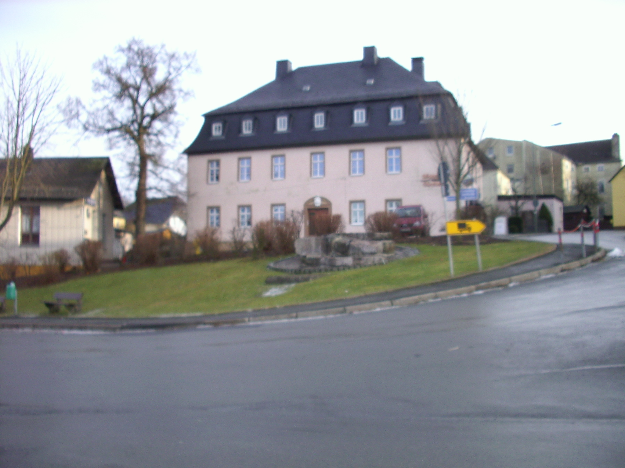 Mühlteichplatz - Markt Sparneck (Landkreis Hof, Oberfranken)